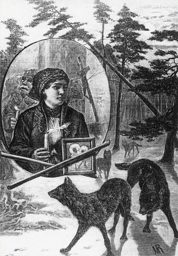 Божья матерь громничная с волками. Рисунок XIX века.